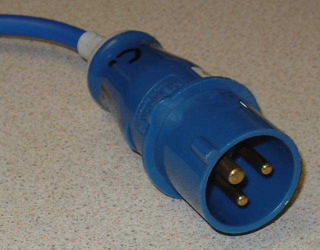 EN 60309 16 Amp 2P+E plug